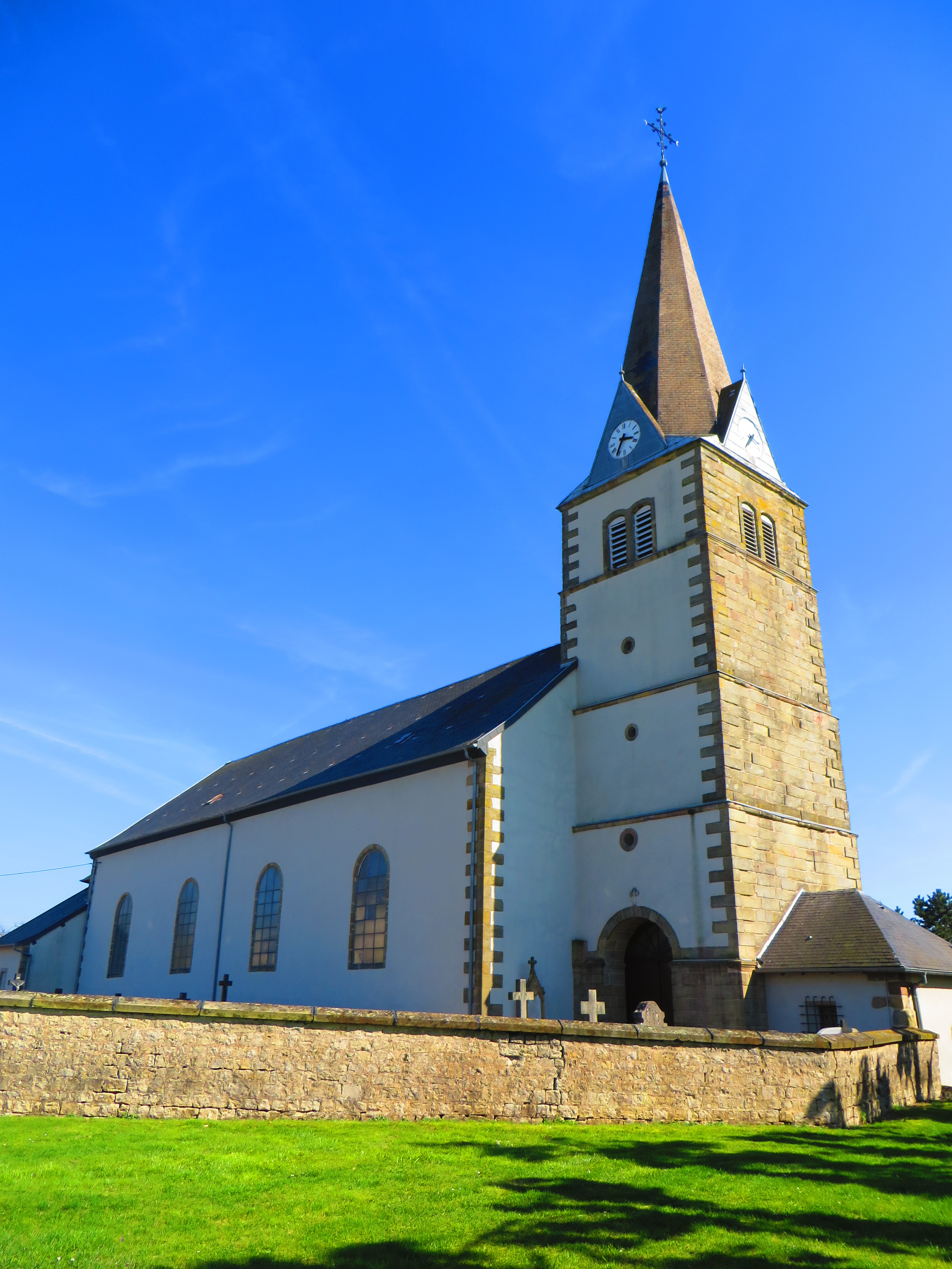 Laning Vahl Église Saint-Pierre et Saint-Paul